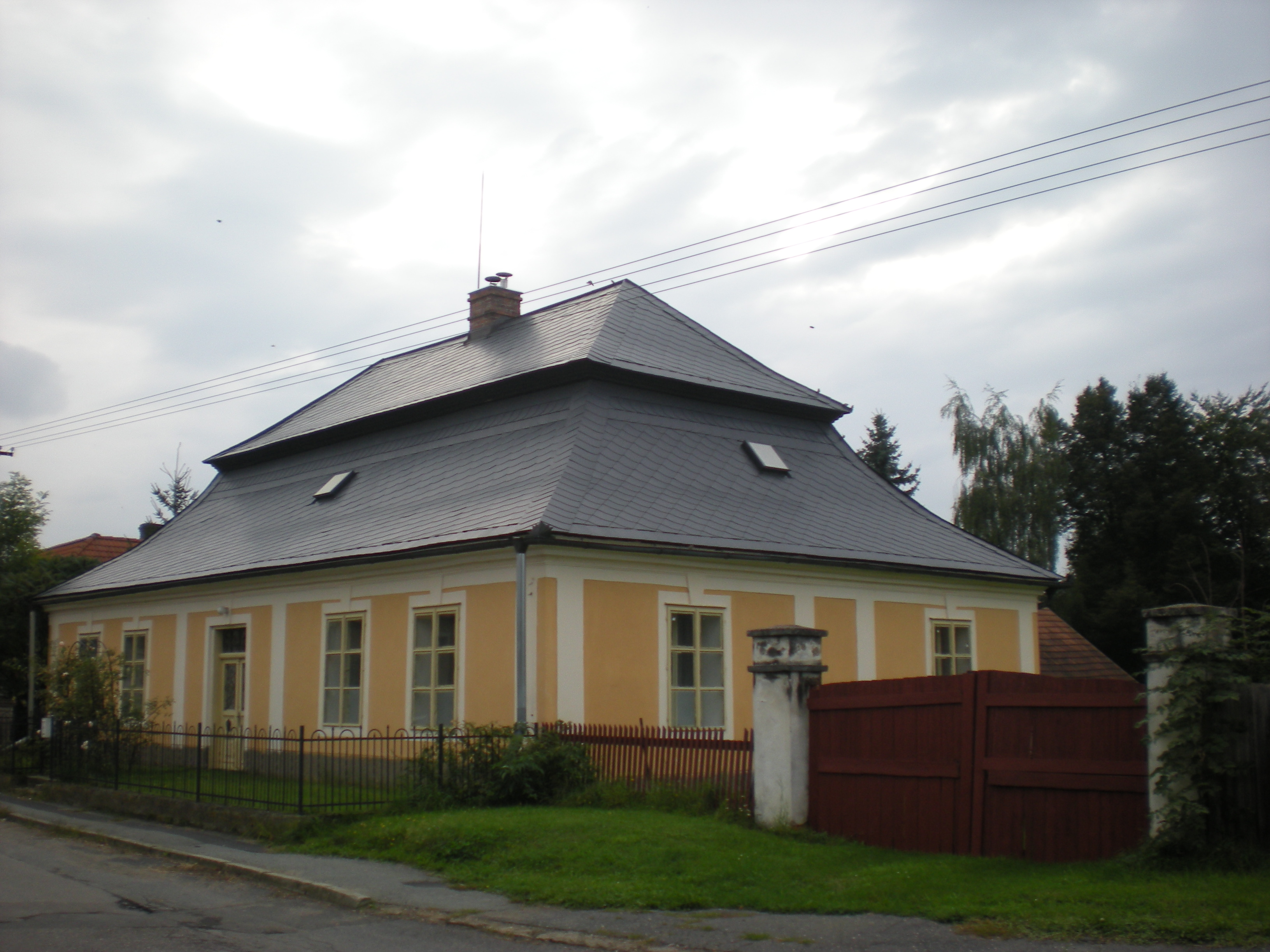 Fara, Vlkaneč 1, Vlkaneč.